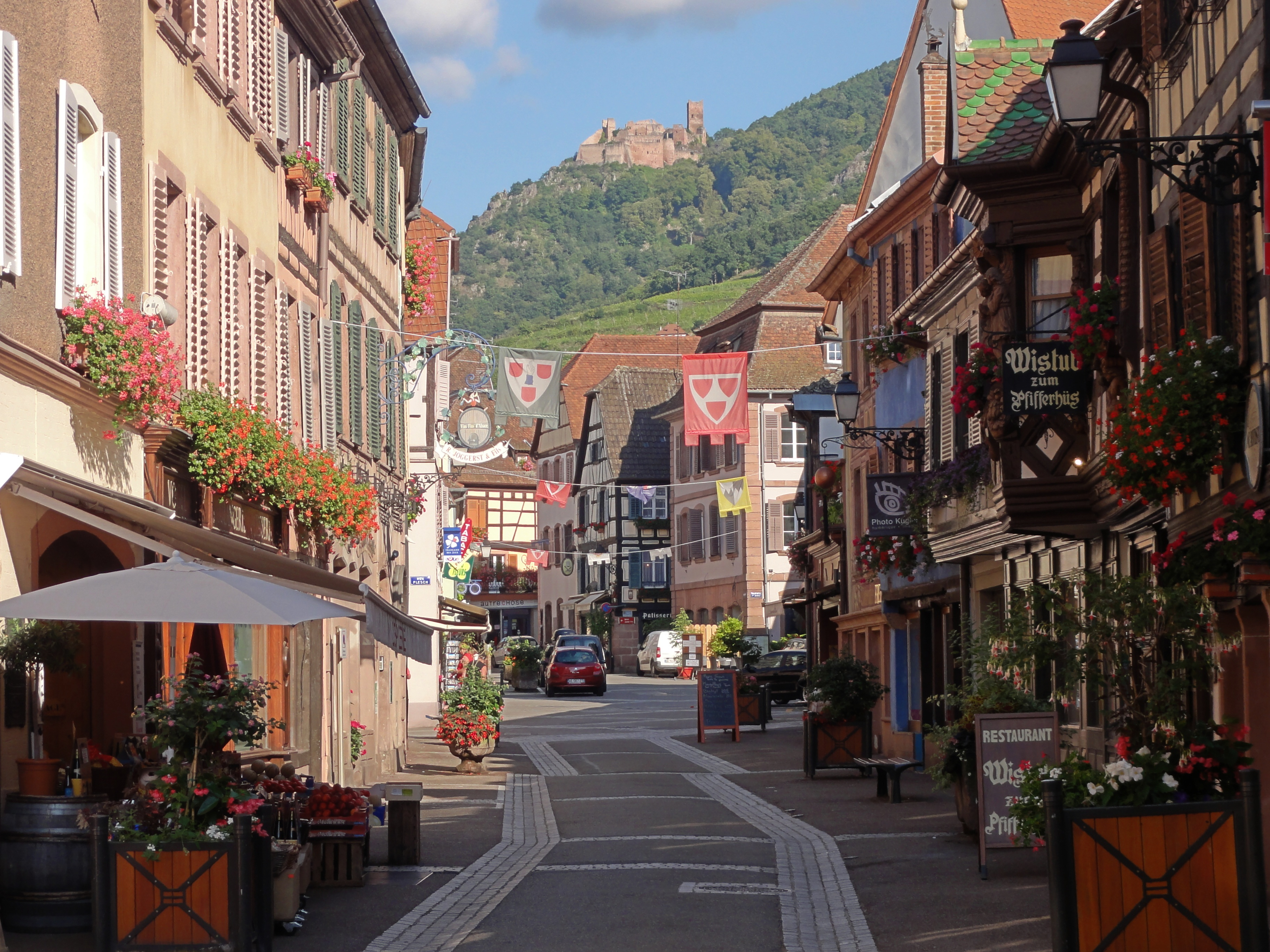 Alsace, Haut-Rhin, Ribeauvillé, Grand’Rue.